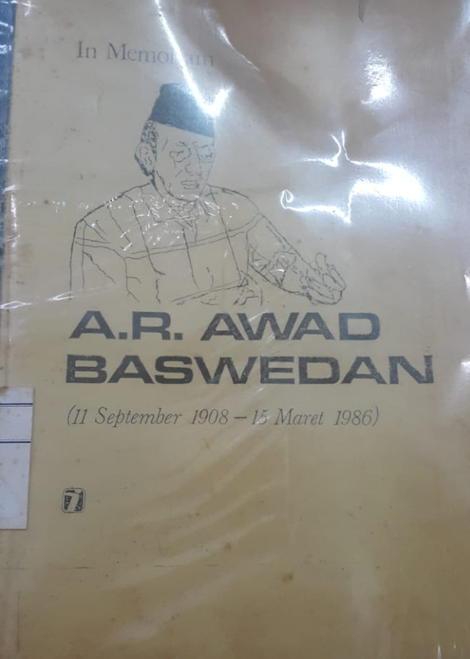 Yayasan Idayu menerbitkan obituari dan reportase berbagai media massa lokal dan nasional tentang wafatnya A.R. Baswedan